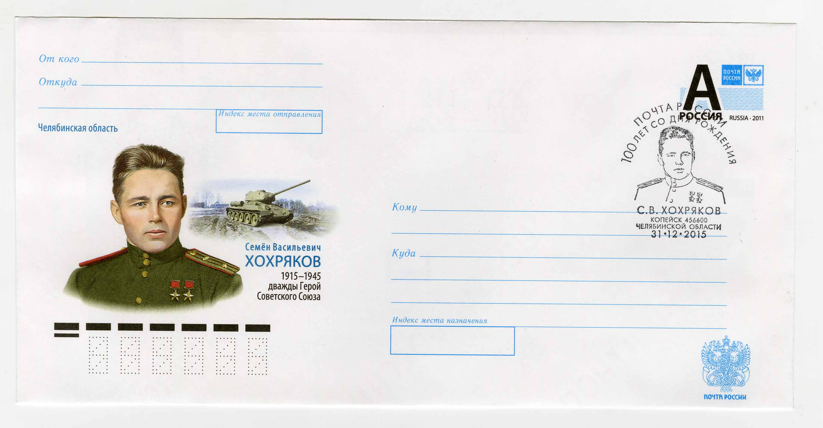 Хохряков, Семён Васильевич, почтовый конверт РОССИЯ